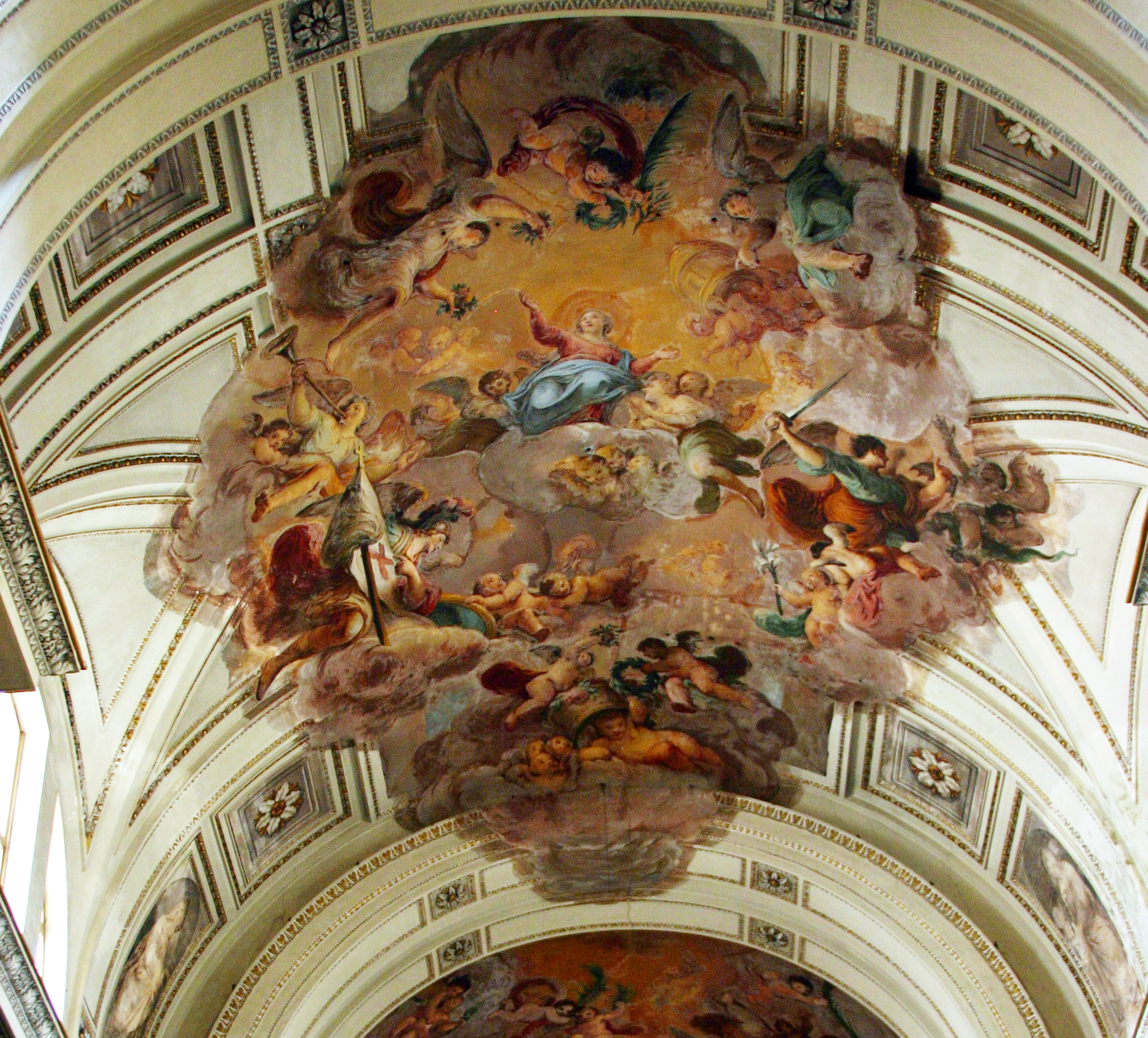 Cathedral of Palermo